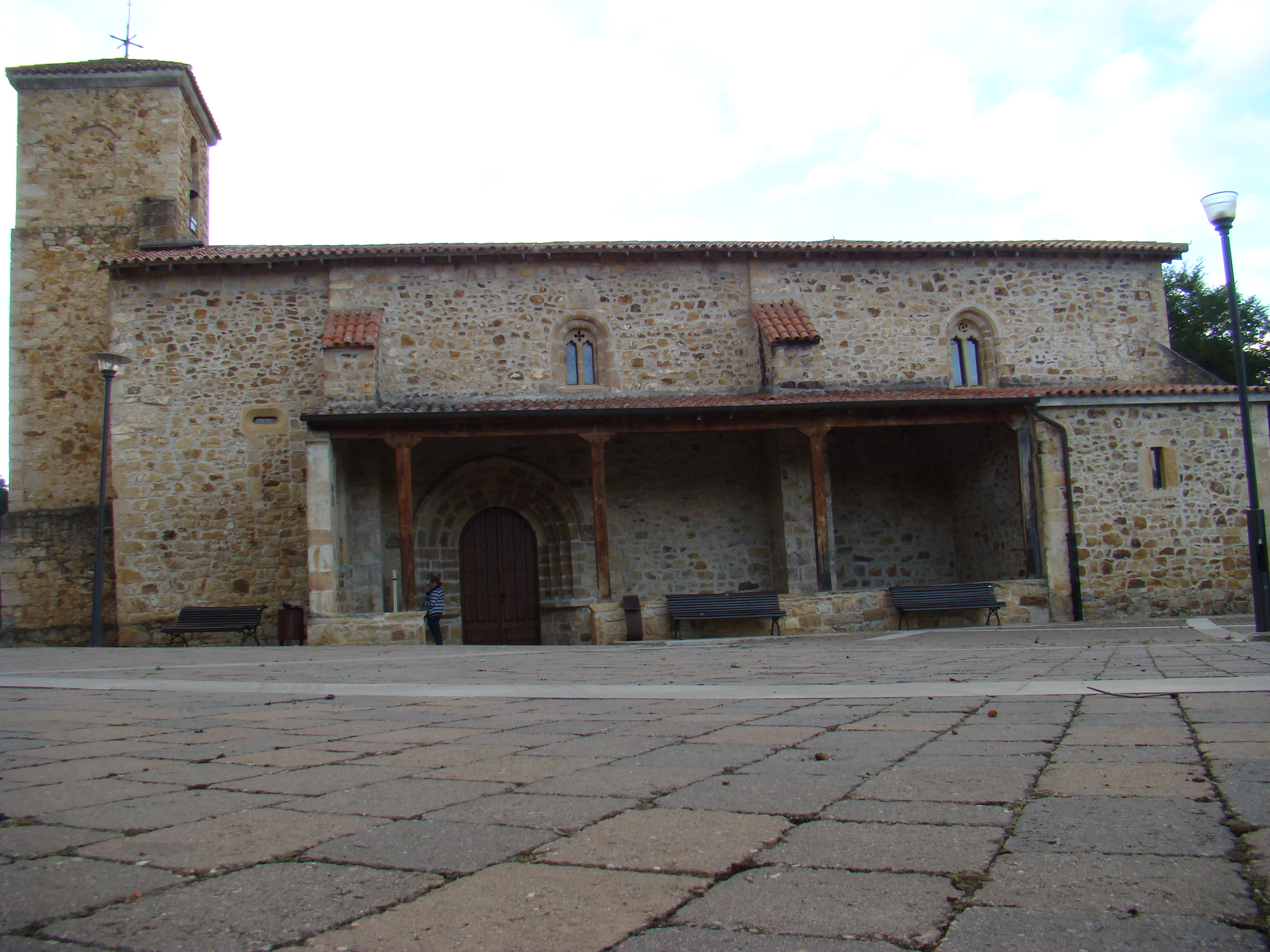 Pórtico de la iglesia de San Martín en la localidad de Cereceda del municipio de Rasines en Cantabria, España.